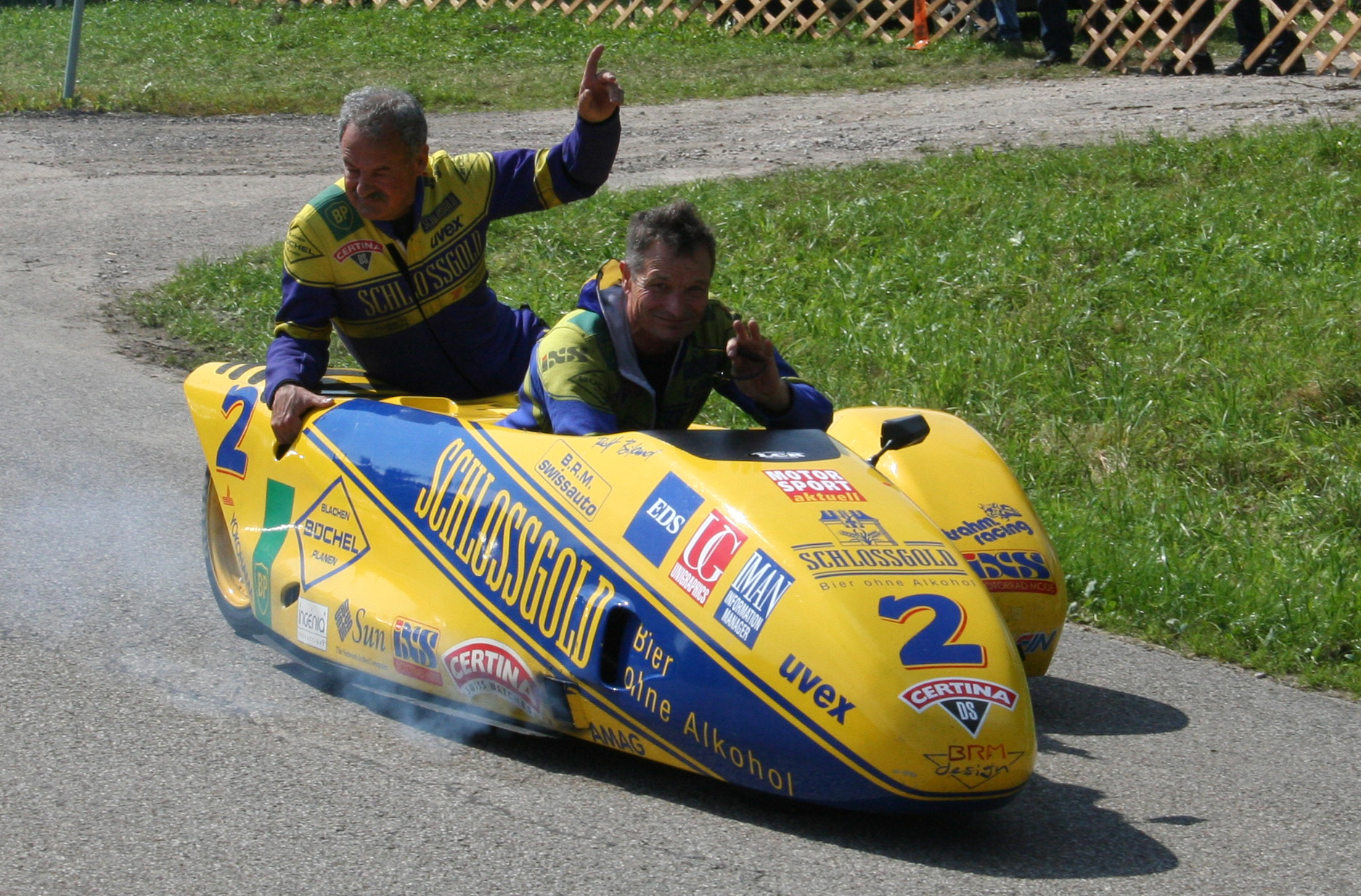 Rolf Biland und Kurt Waltisperg beim Oldtimer Grand Prix in Schwanenstadt, Oberösterreich, am 7. September 2014